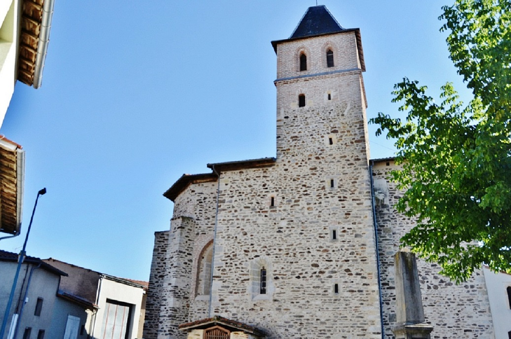 Le Tarn